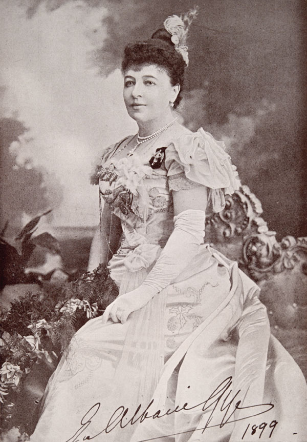 Emma Albani, 1899 portrait